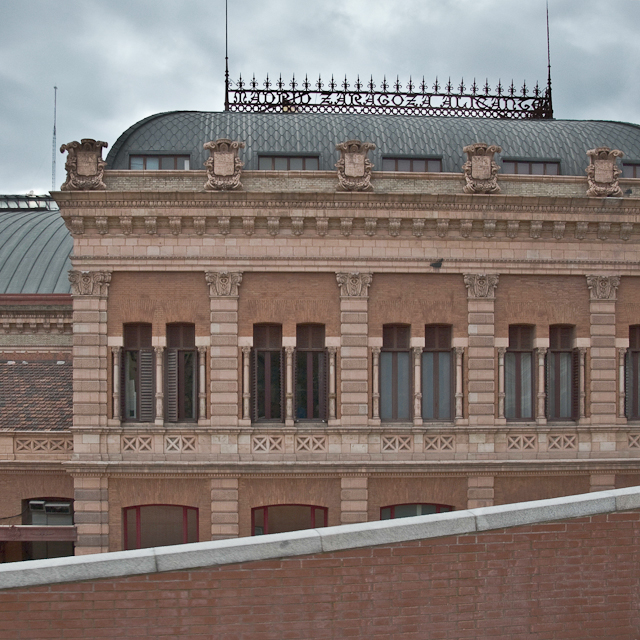 Vista exterior de la cubierta de la Estación de Atocha, Madrid. España.